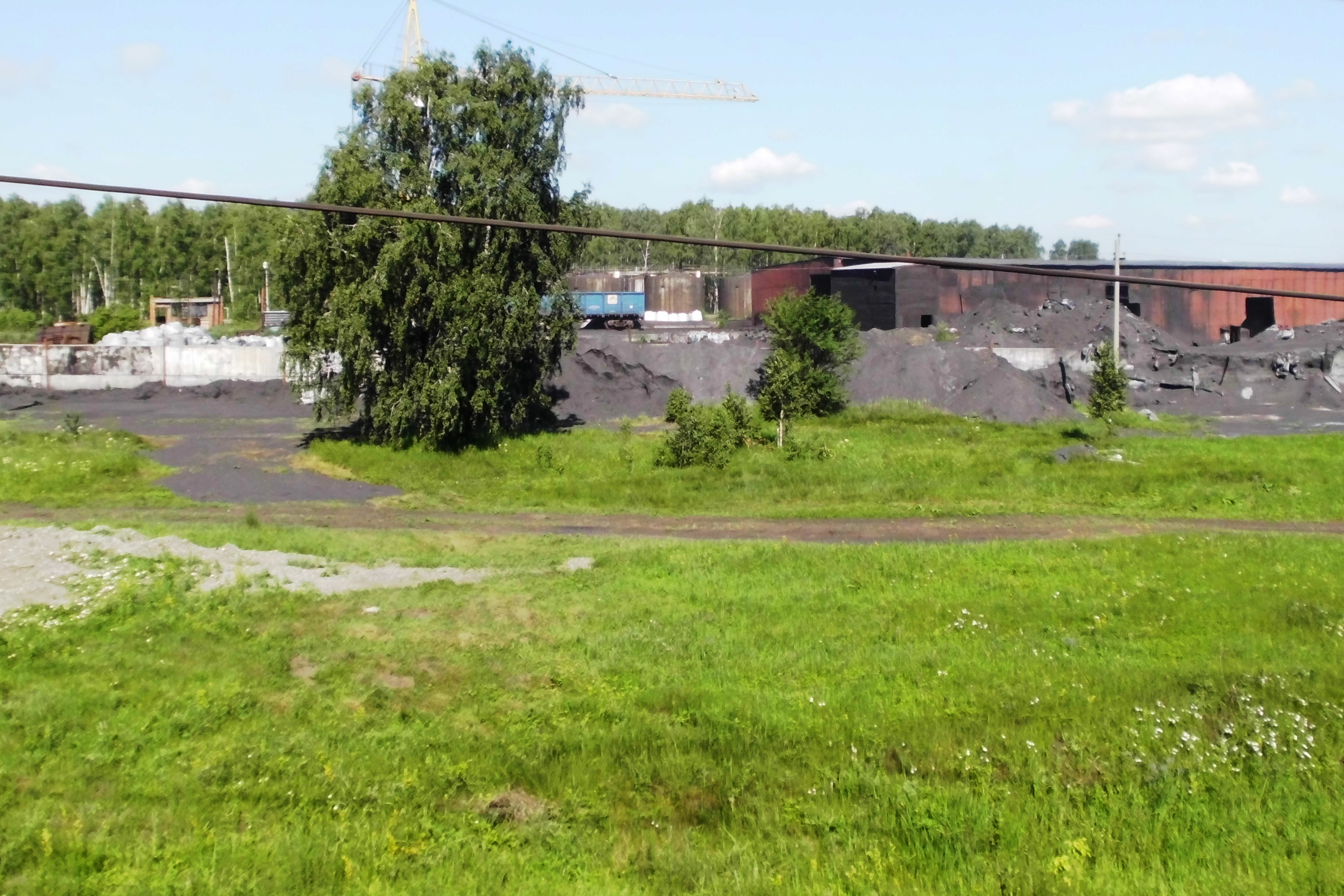 Посёлок Муслюмово Кунашакского района Челябинской области. Загрузка на железнодорожный состав рудного концентрата Сосновского рудника Теченского месторождения магнетитовых руд.